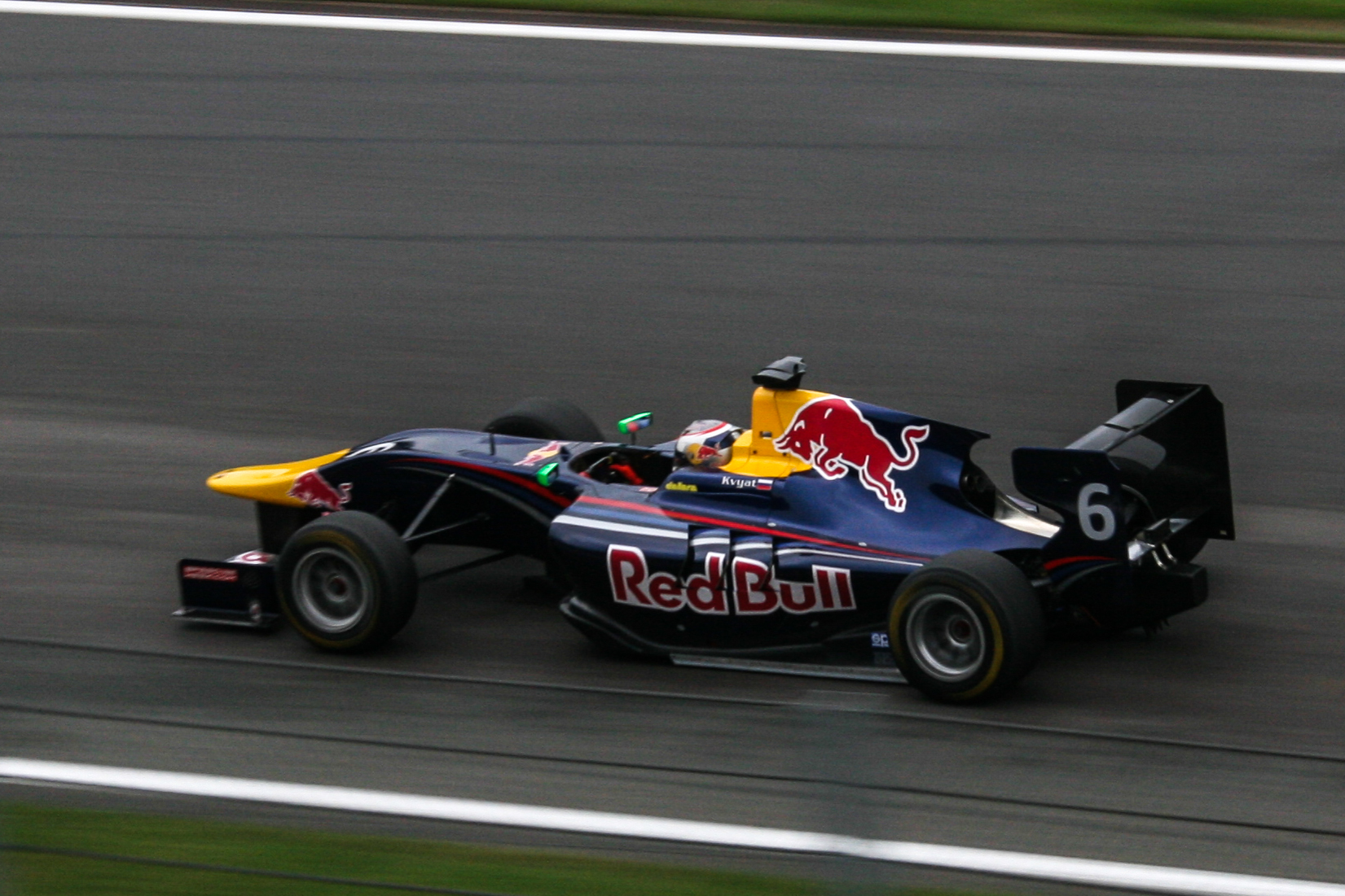 Daniil Kwjat beim Sprintrennen der GP3-Serie in Spa-Francorchamps 2013.